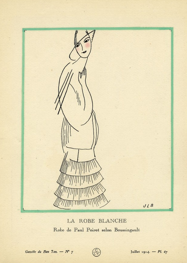 Pl. 67 : La Robe Blanche de Paul Poiret par Jean-Louis Boussingault [JLB], in Gazette du Bon Ton, issue 7, July 1914.